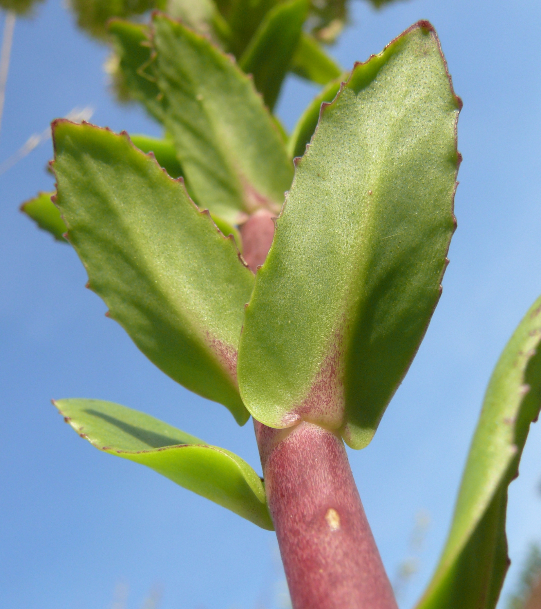 Sedum (Hylotelephium telephium subsp. maximumHohenlohe, Deutschland